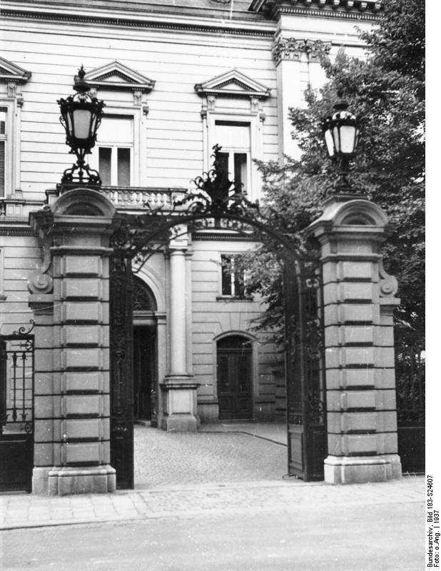 Scherl: Wien: Haupteingang der deutschen Gesandtschaft. 1937 1388-37